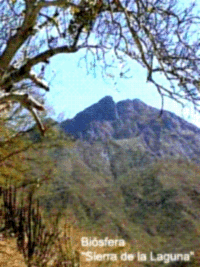 Imagen de la Sierra de la Laguna